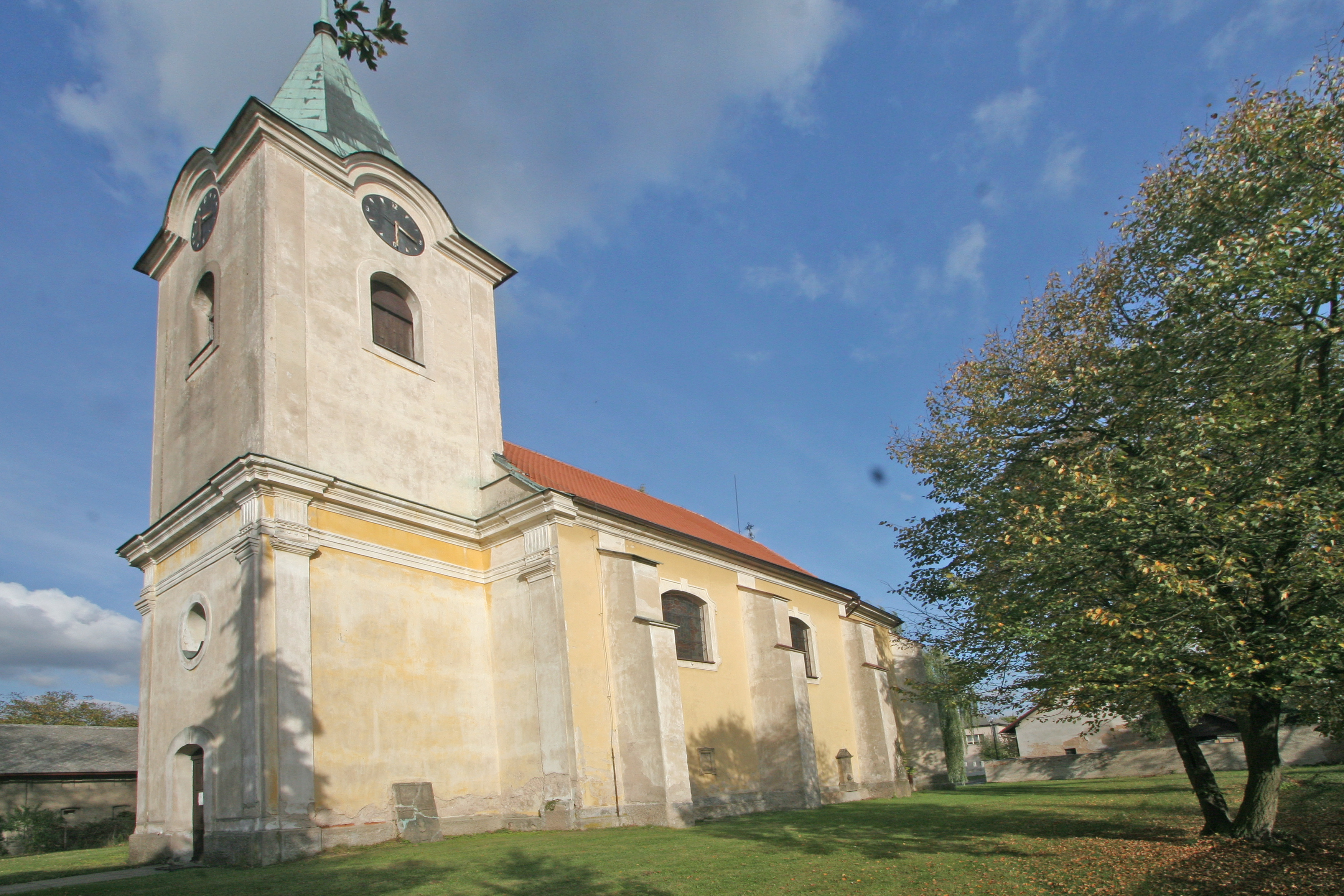 Kostel sv. Jakuba Většího (Kratonohy), Kratonohy